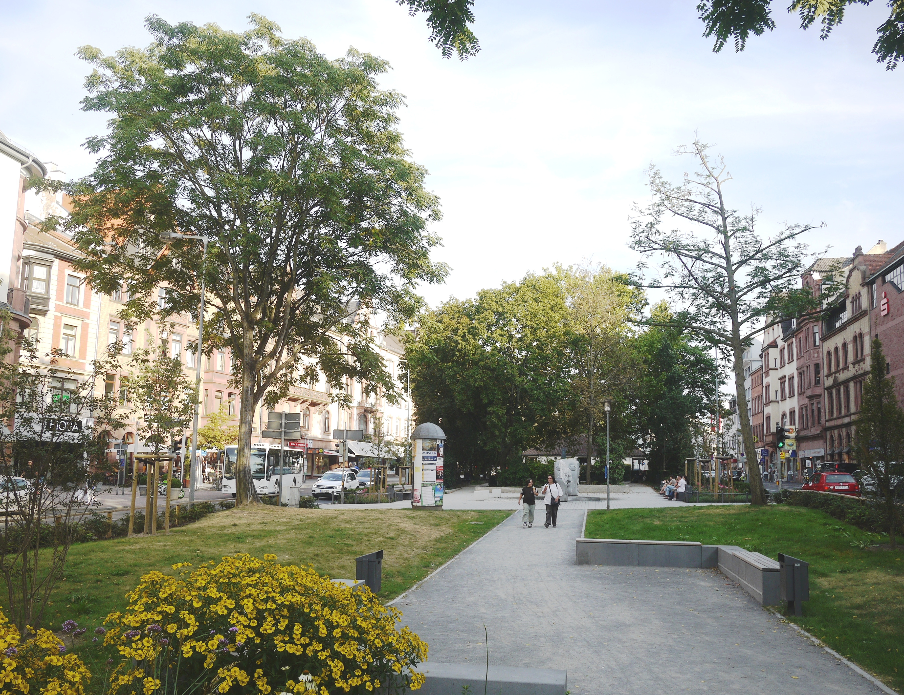 Denkmalgeschütztes Ensembel Friedrichstraße/Weißenburger Straße in Aschaffenburg